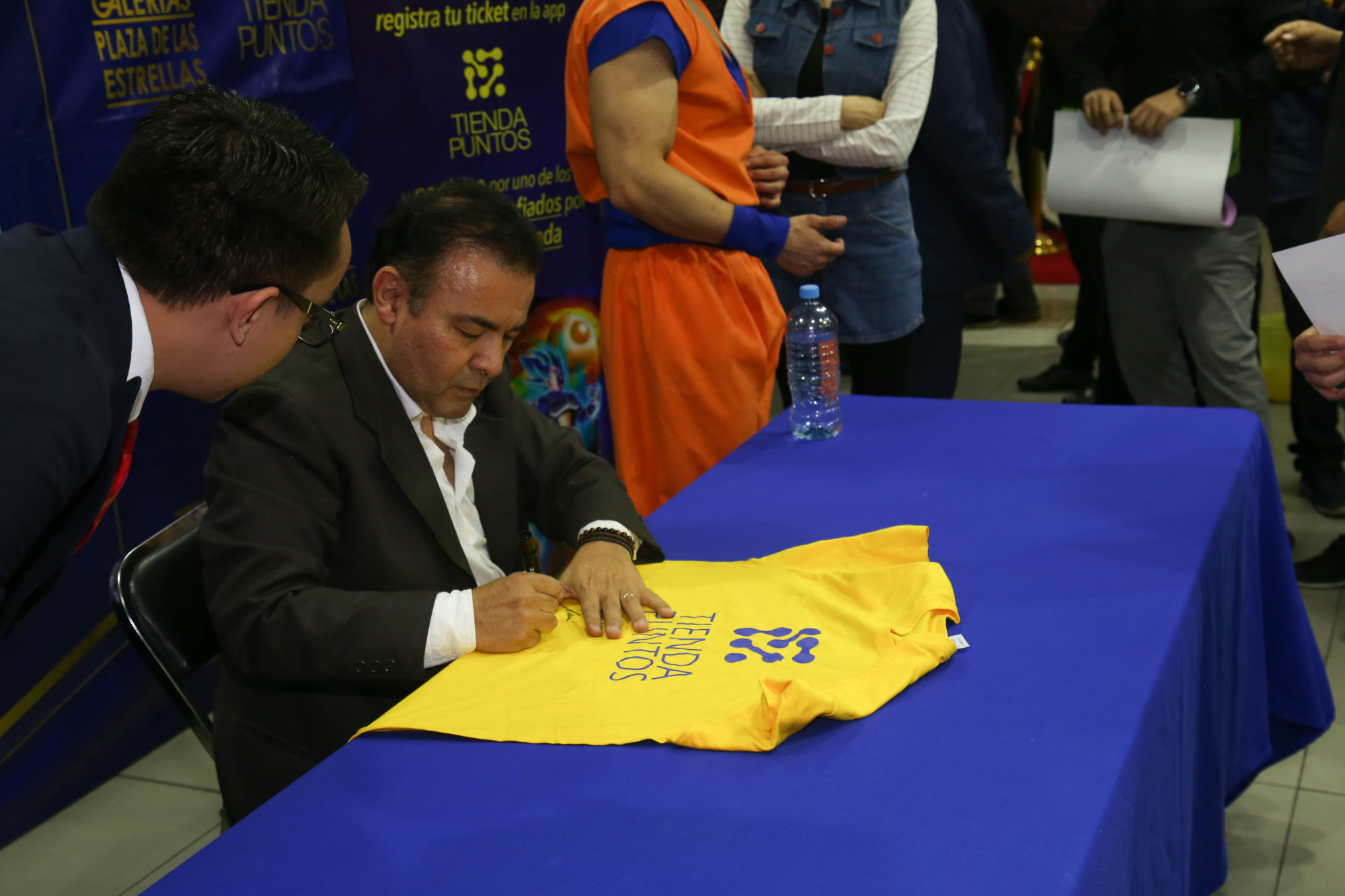 Mario Castañeda firamando una playera de Tienda Puntos después de la proyección de la película de Dragonball Super: Broly